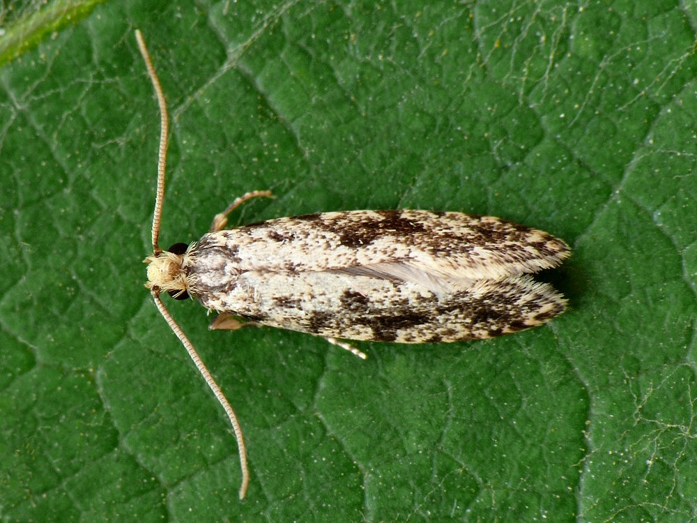 Nemapogon granella